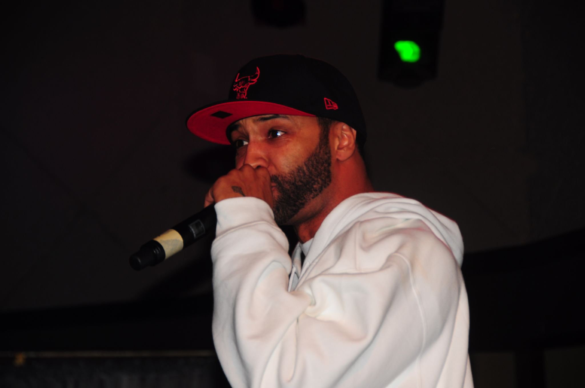 Joe Budden